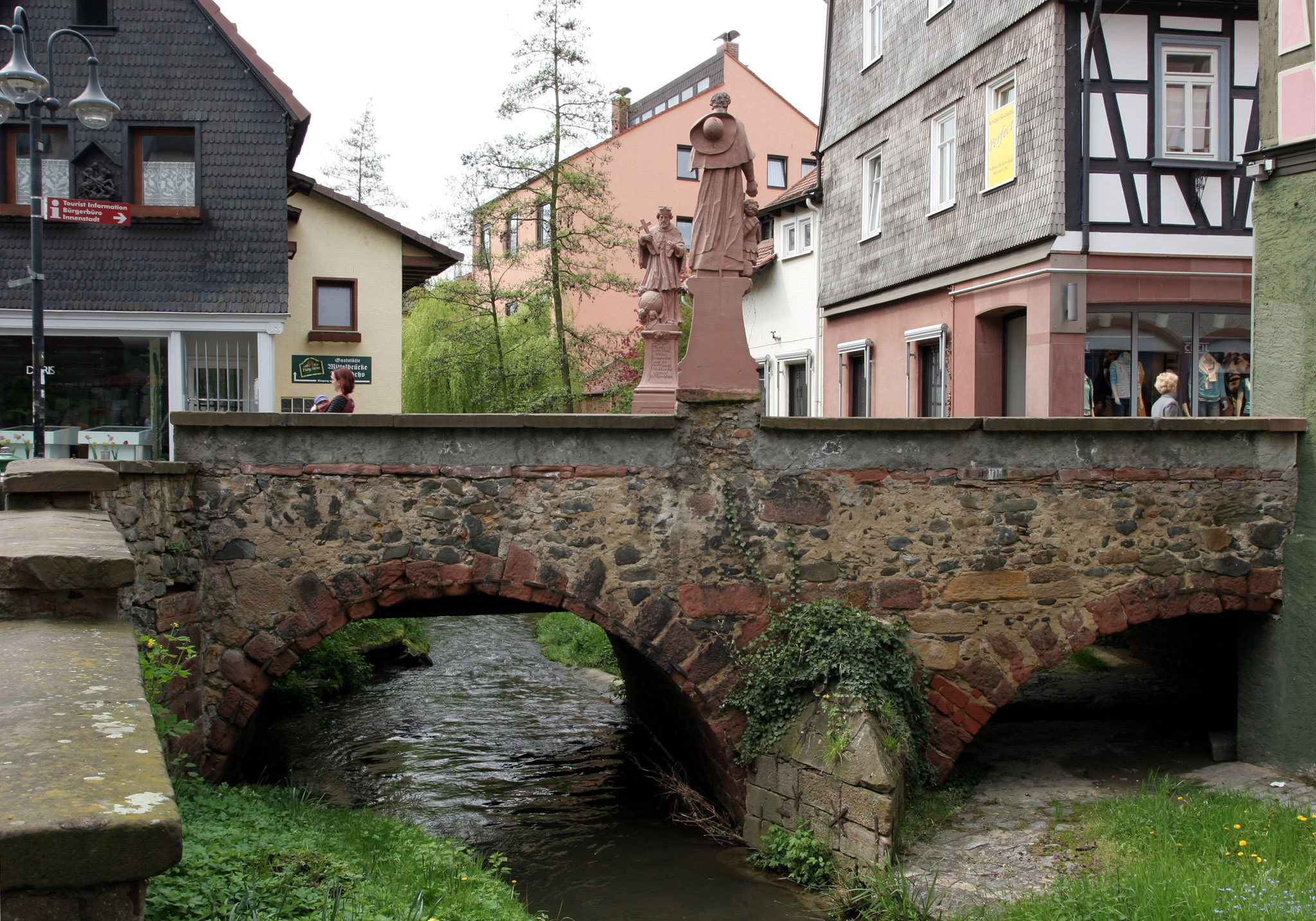 Die Mittelbrücke in Bensheim an der Bergstraße (Südhessen)